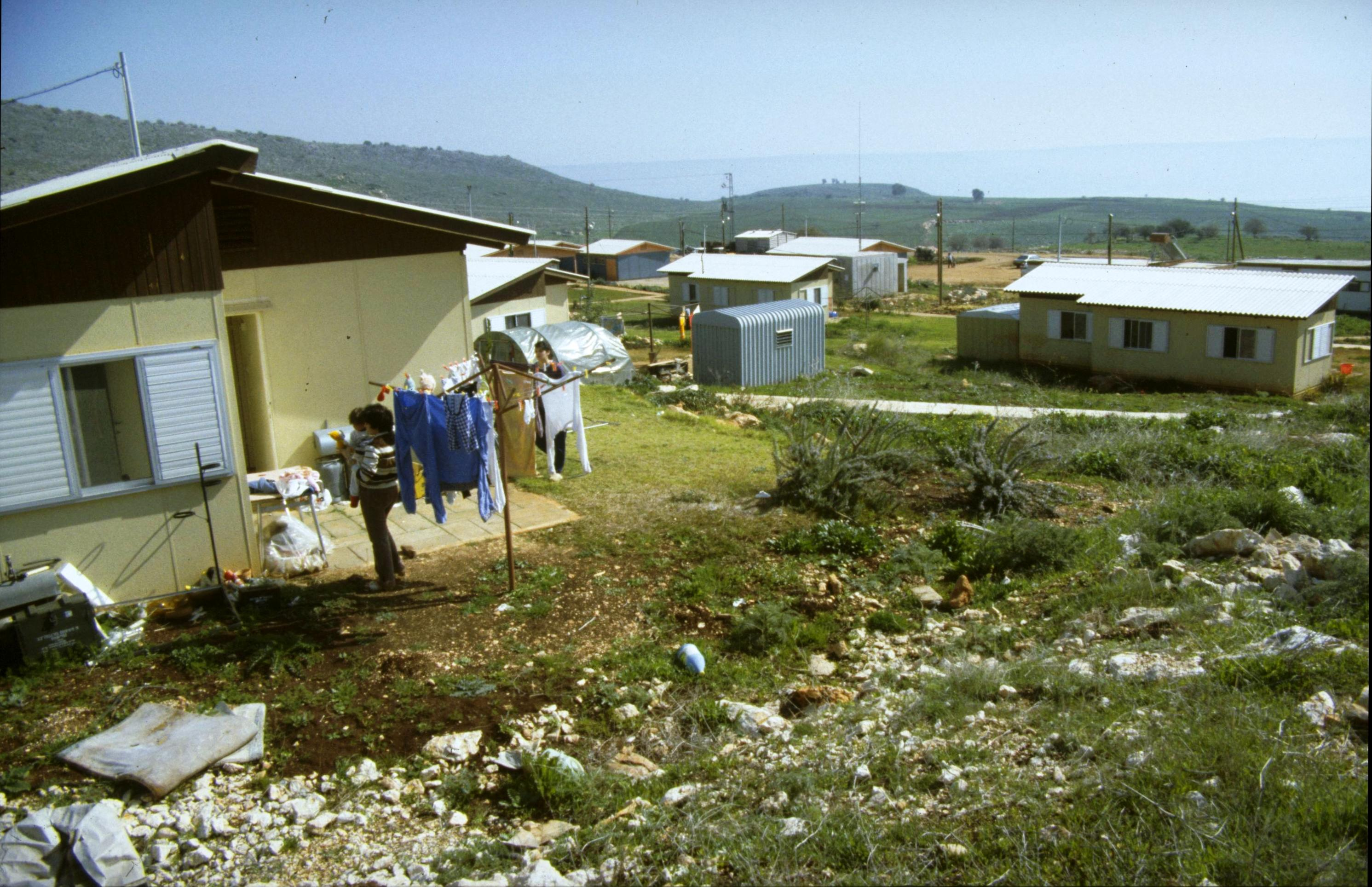 A view overlooking homes of Moshav Kachal in the Galilee, east of the Golani Junction in the north. מבט על בתים ביישוב מושב מיכאל שבגליל, מזרחית לצומת גולני Photo: HARNIK NATI, 02/10/1983